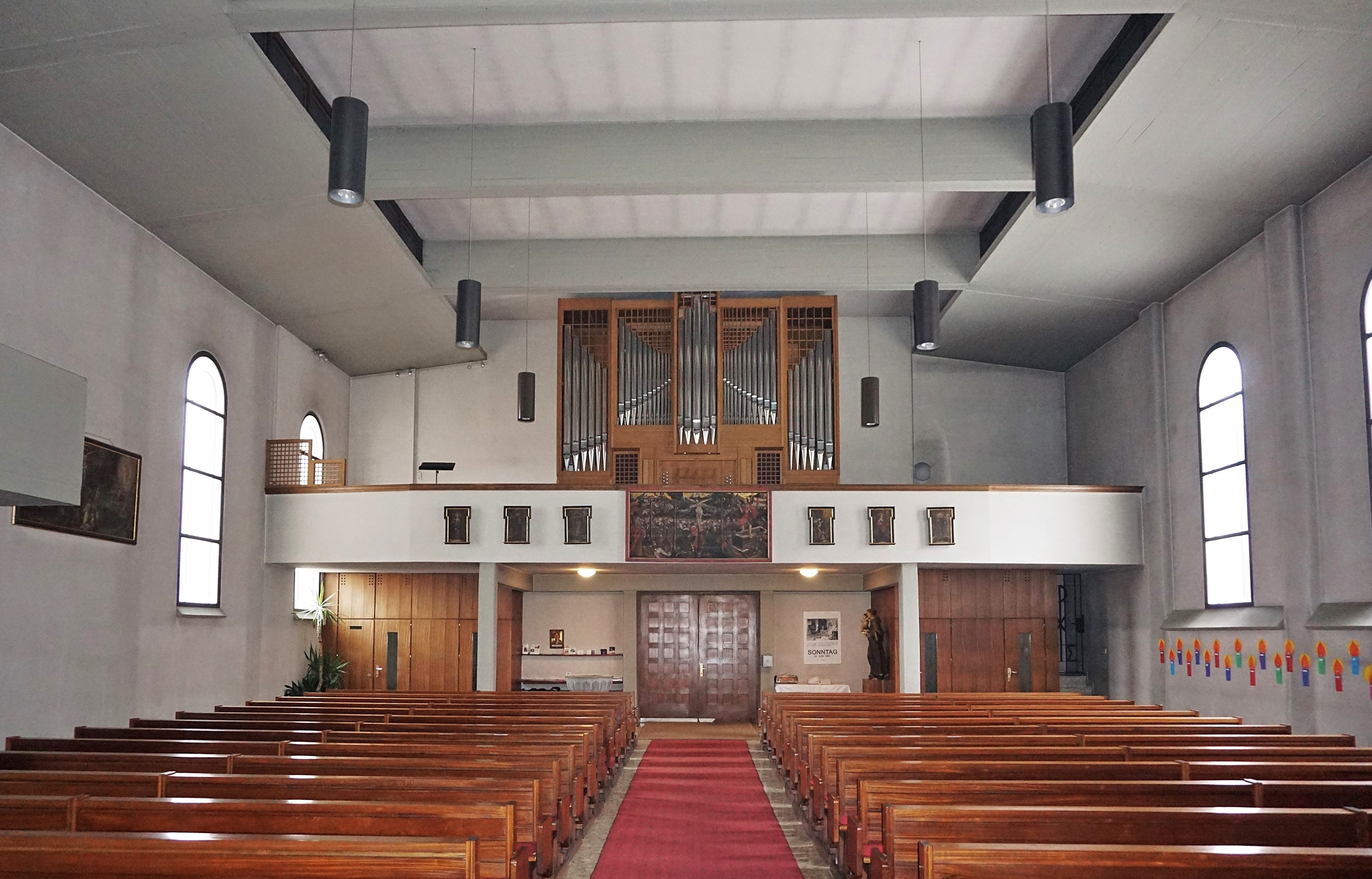 Kath. Pfarrkirche Sl. Martin (Villach), Blick zur Orgelempore